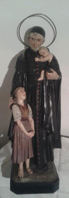 Imágen de San Vicente de Paúl, realizado en la fábrica de "Las Artes Religiosas" de Olot. Circa 1904. Está realizado en cartón-madera